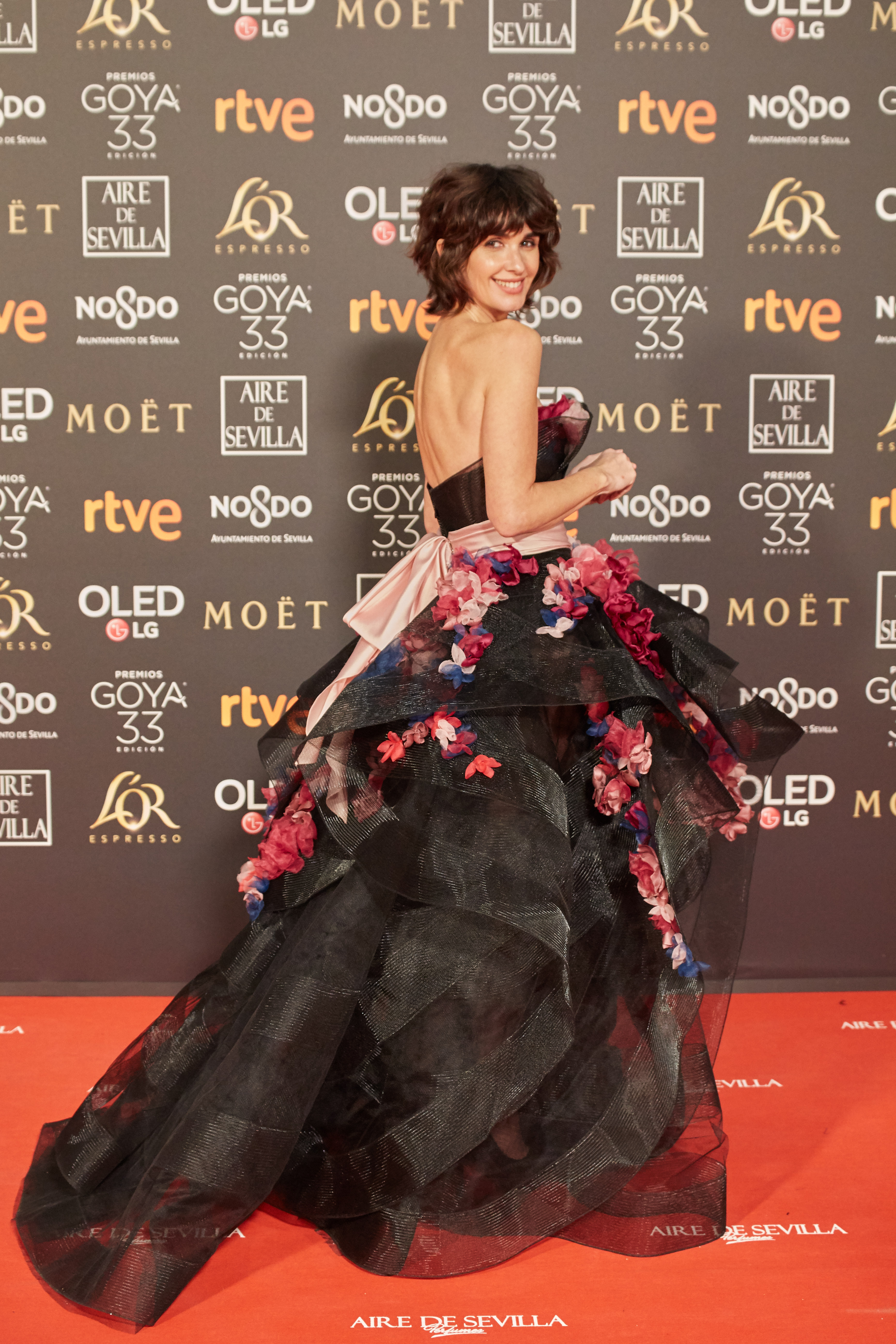 Paz Vega en la alfombra roja de los Premios Goya celebrados en Sevilla en Febrero 2019